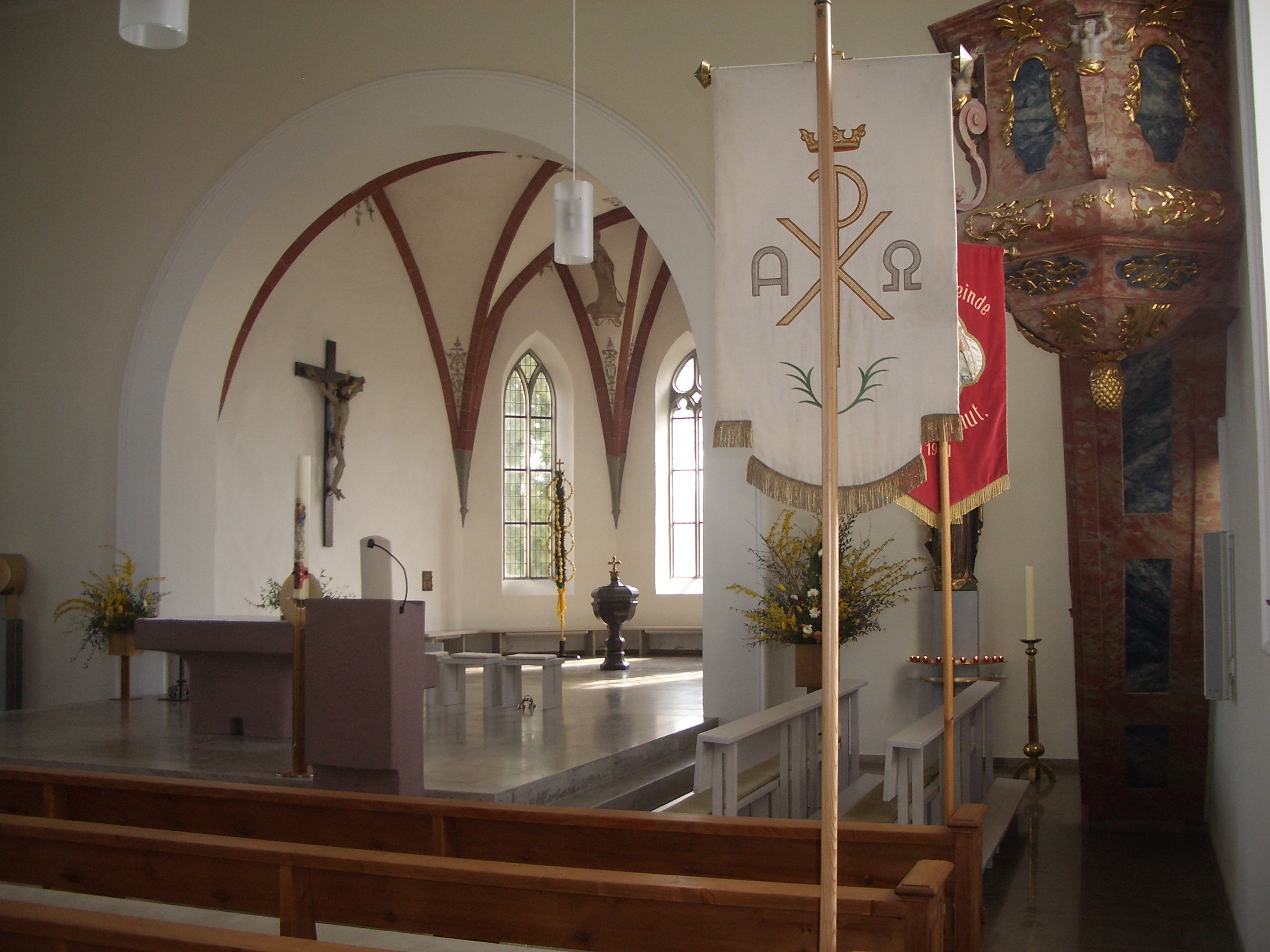 Pfarrkirche St. Gallus und Nikolaus, Grünkraut, Landkreis Ravensburg Innenansicht